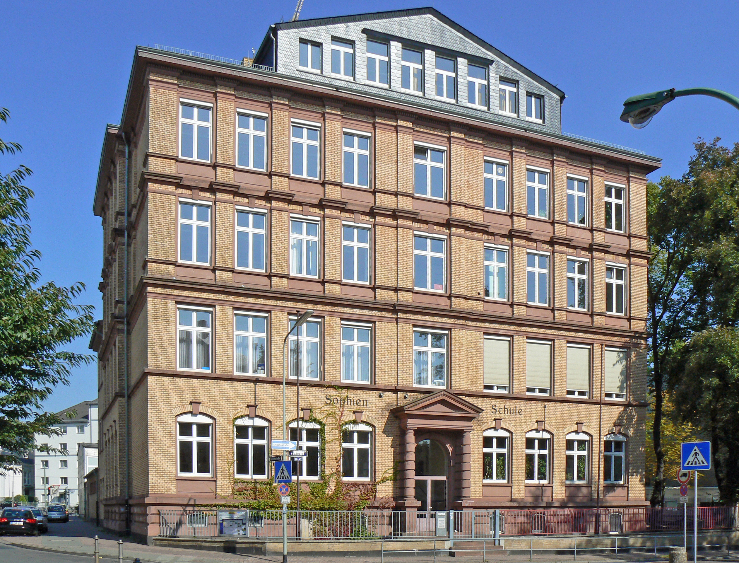 Sophienschule